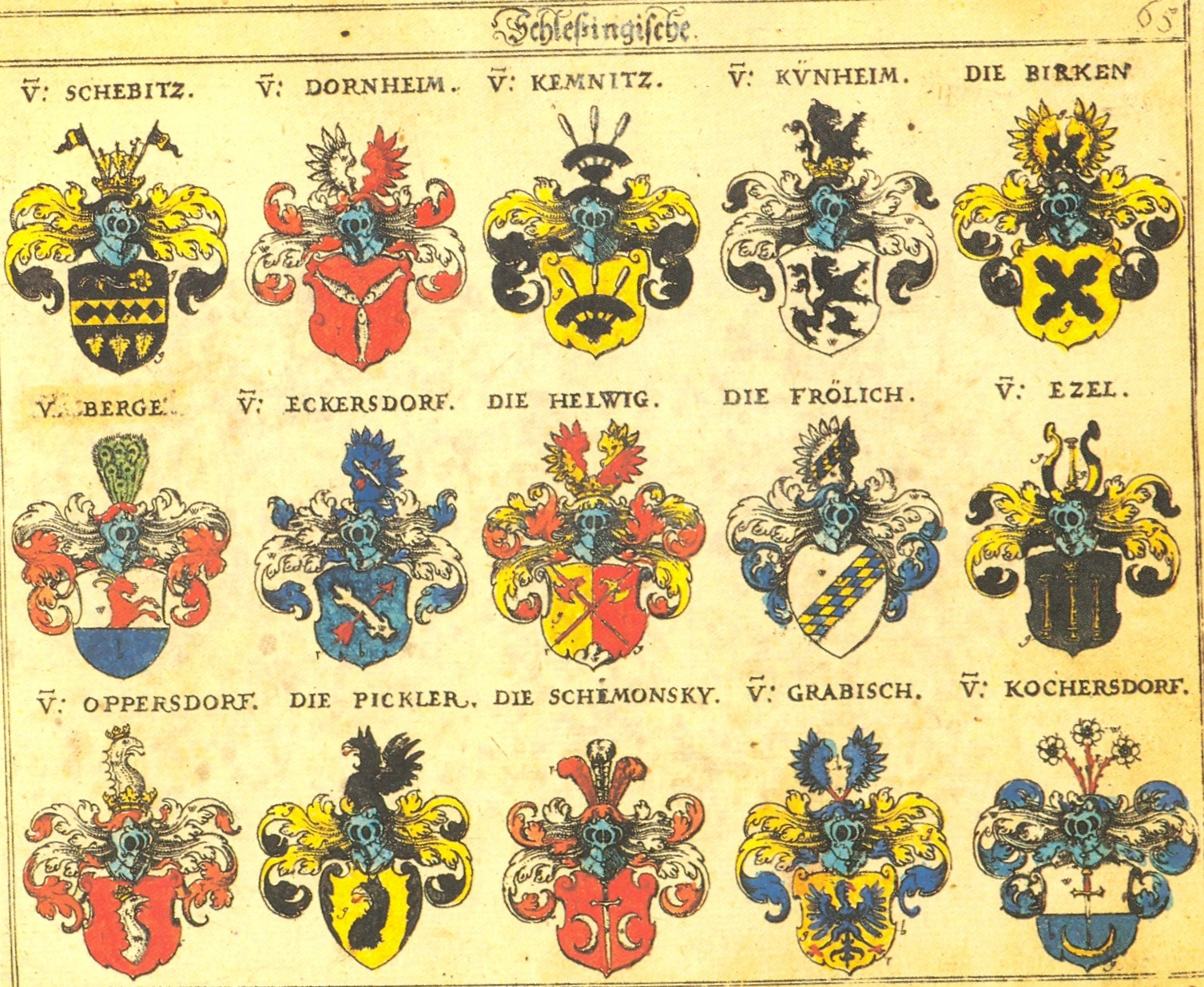 Johann Siebmacher: New Wappenbuch eingescannt aus: Horst Appuhn (Hrsg.), Johann Siebmachers Wappenbuch. Die bibliophilen Taschenbücher 538, 2. verb. Aufl , Dortmund 1989 Schlesische Blatt 65